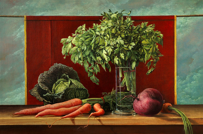 Reproduktion Wismarer Stillleben mit Petersilie (2006) von Manfred W. Jürgens